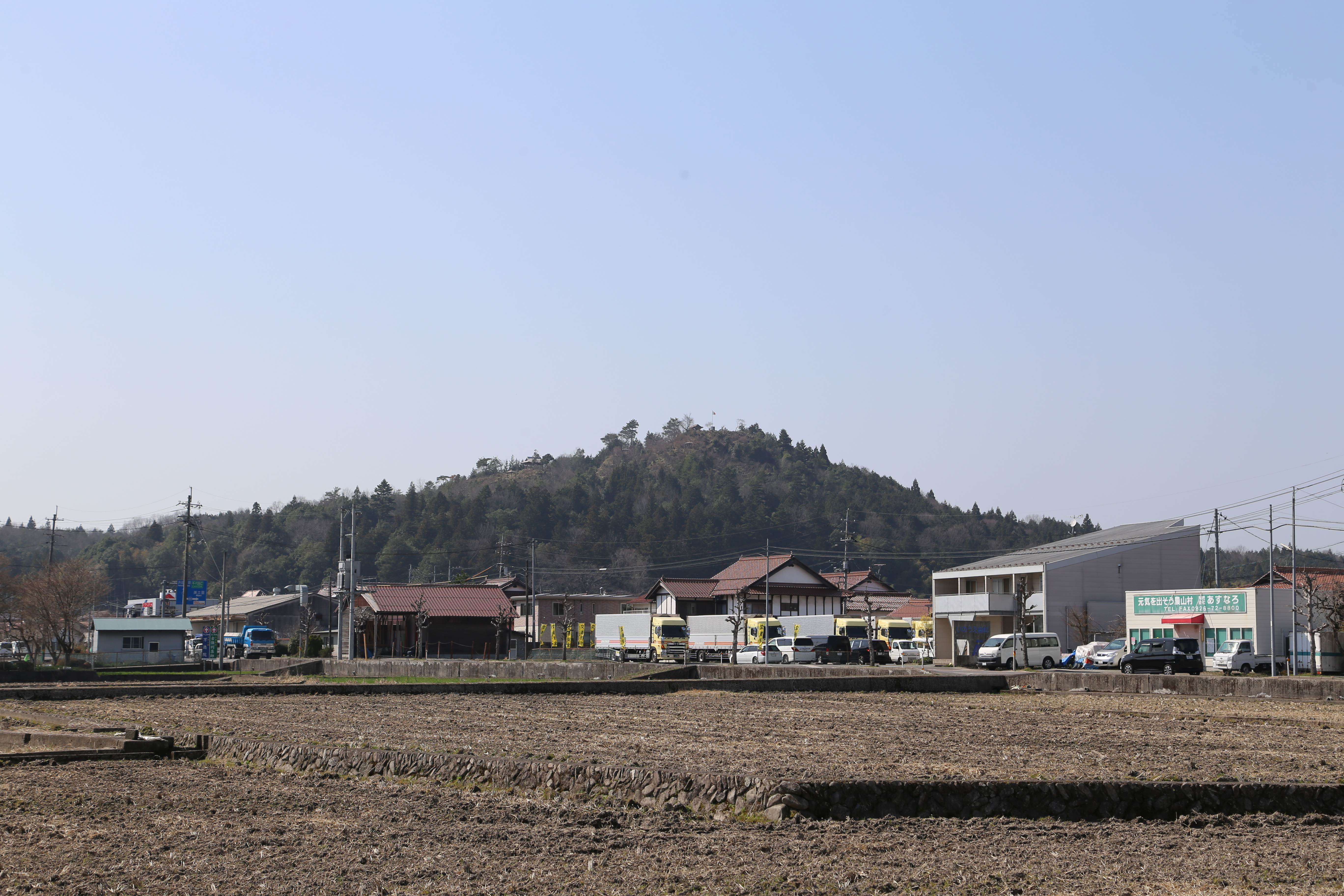 広島県北広島町にある壬生城跡遠景